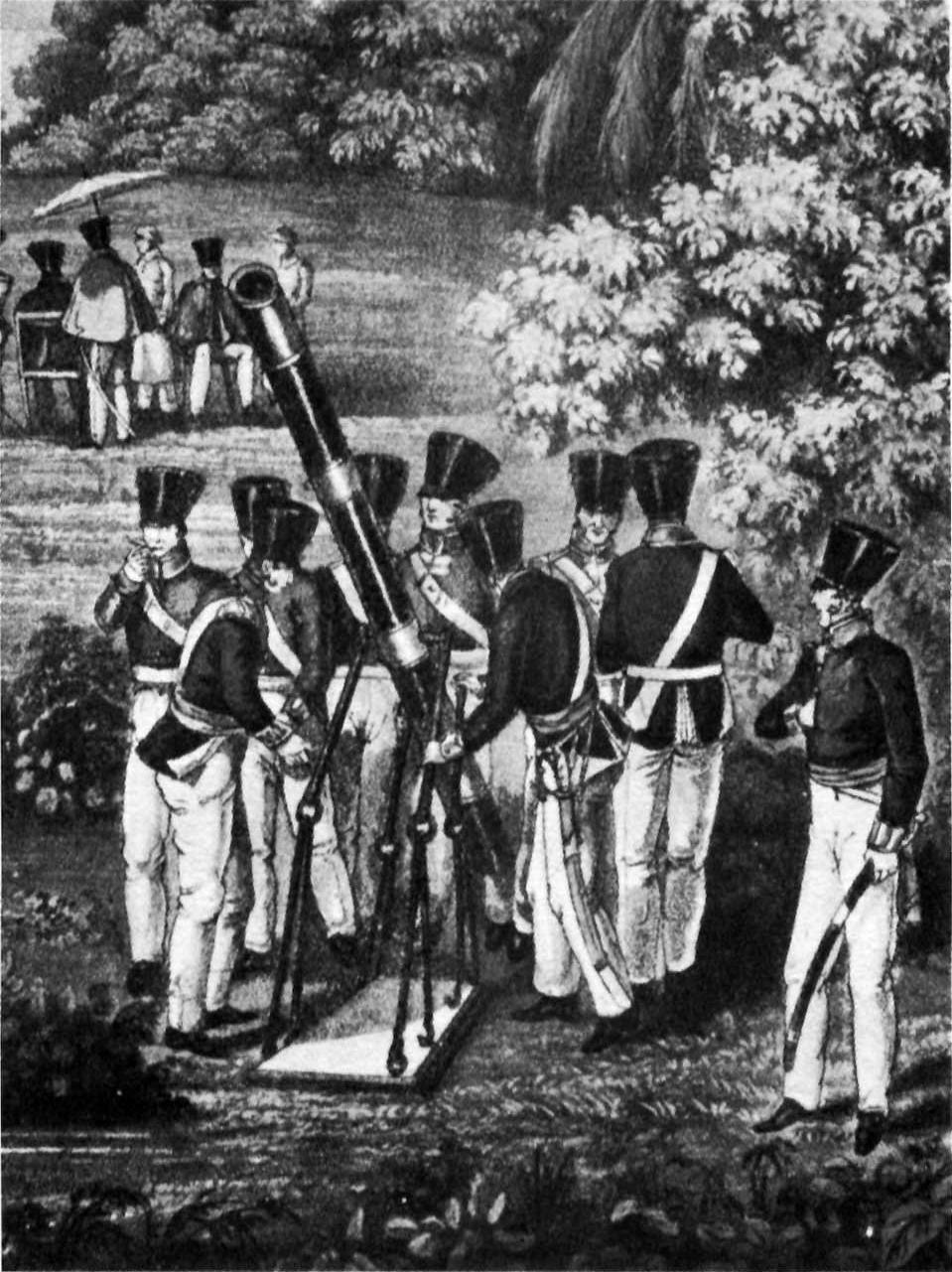 Royal artillerymen in Burma